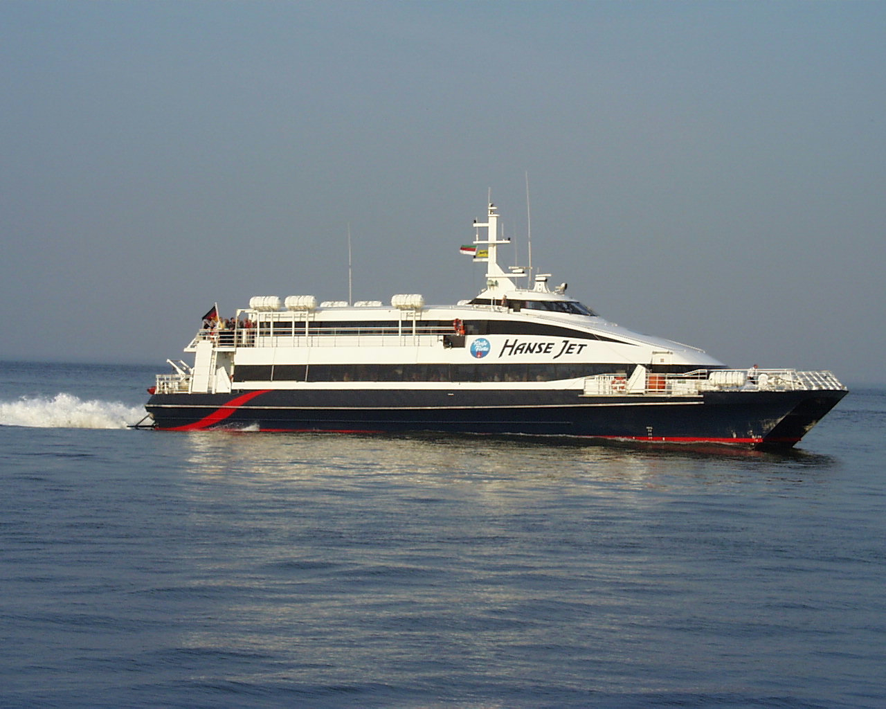 Der Hanse jet kommt aus Helgoland zurück Ship name: Hanse Jet Type: Ferry (catamaran) 1996 Built by Kvaerner Fjellstrand, Omastrand Yard No: 1629 Tons: 467